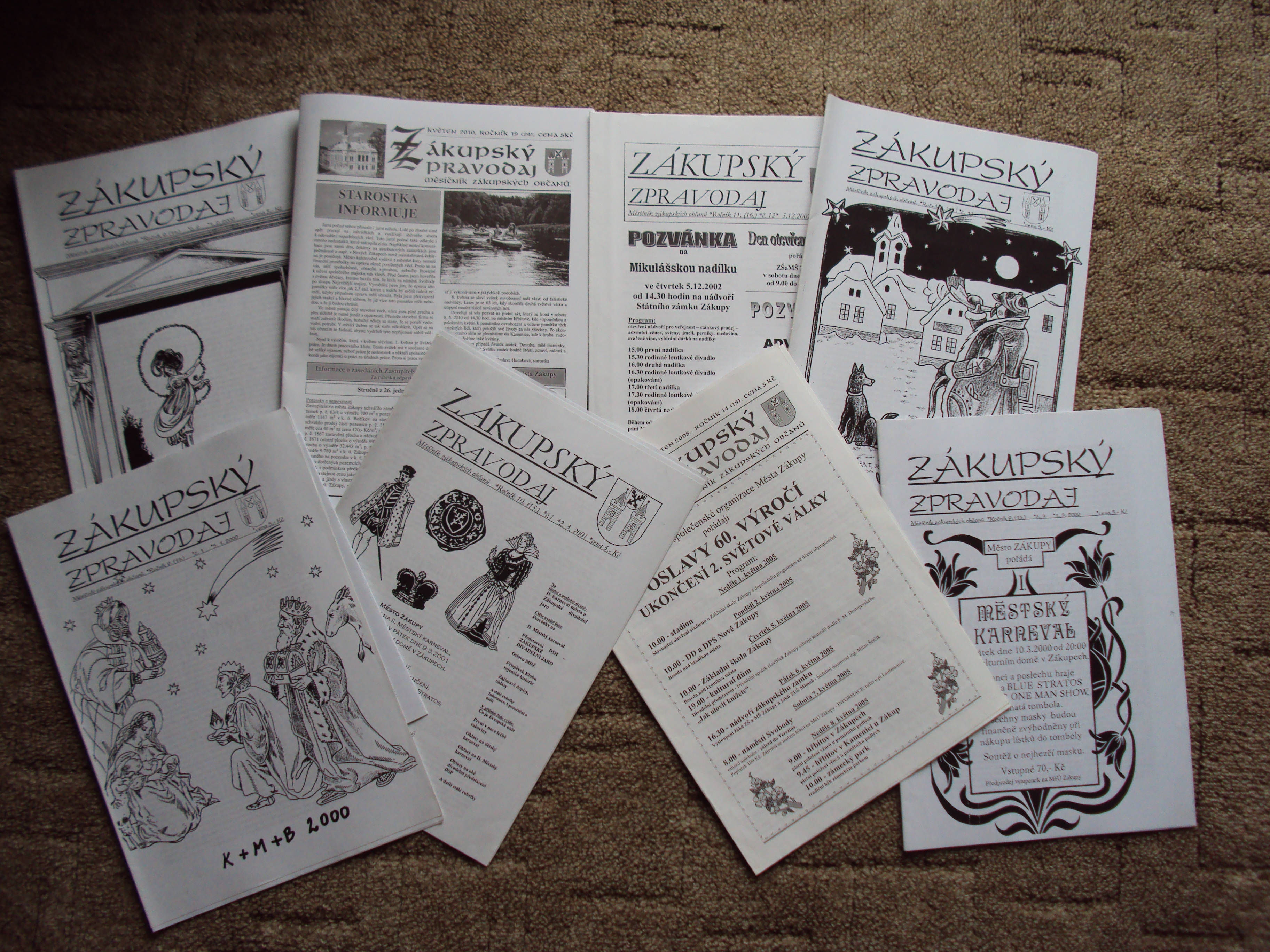 Časopis, ttl.strany z různých roků